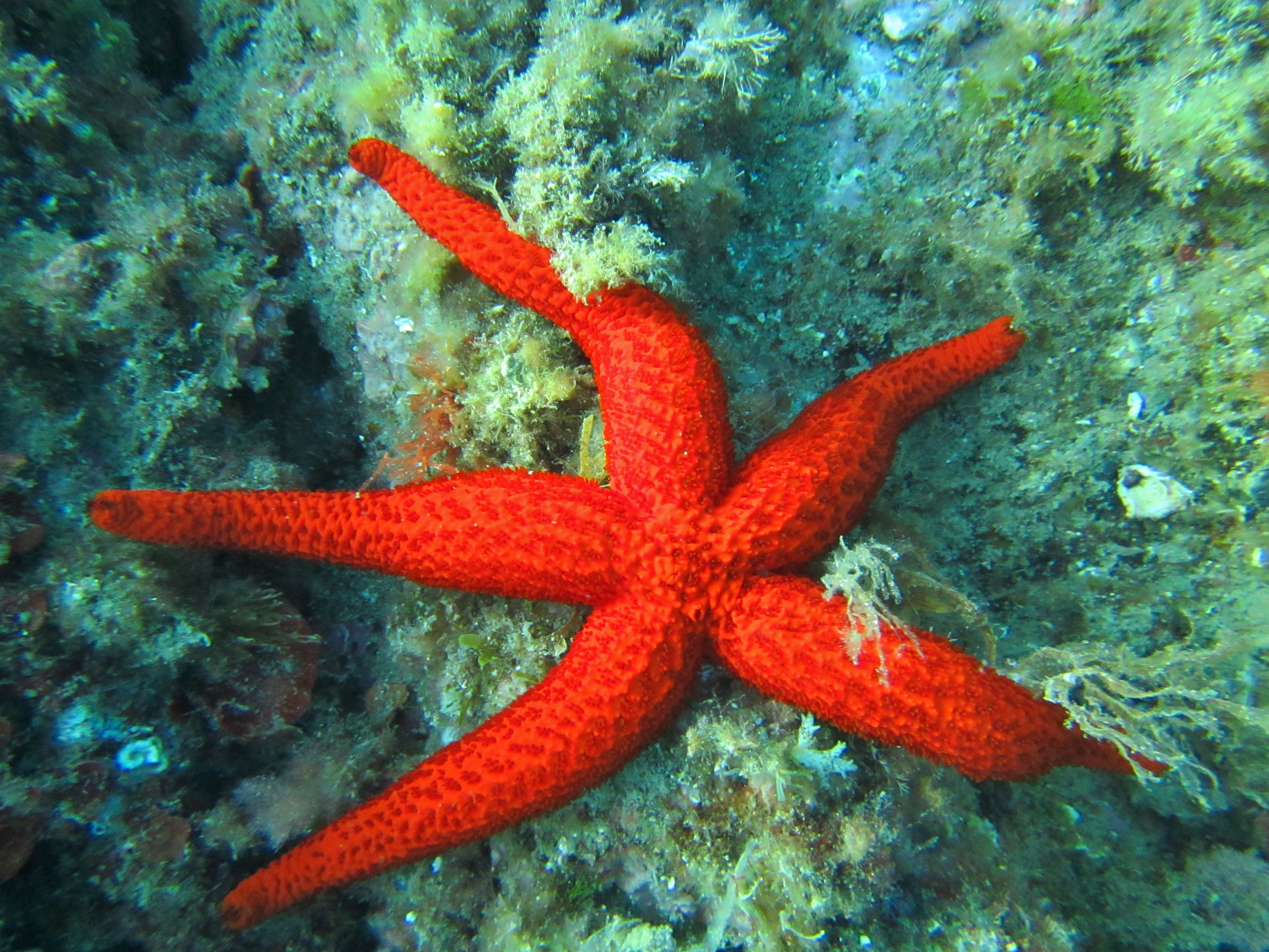 L'étoile de mer rouge méditerranéenne Echinaster sepositus, observée à Banyuls-sur-Mer.